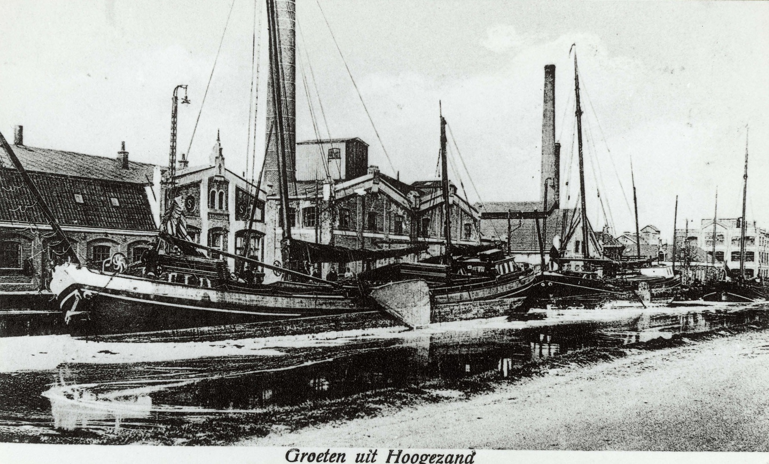 Fabriek Tonden van W.A. Scholten te Foxhol aan het Winschoterdiep